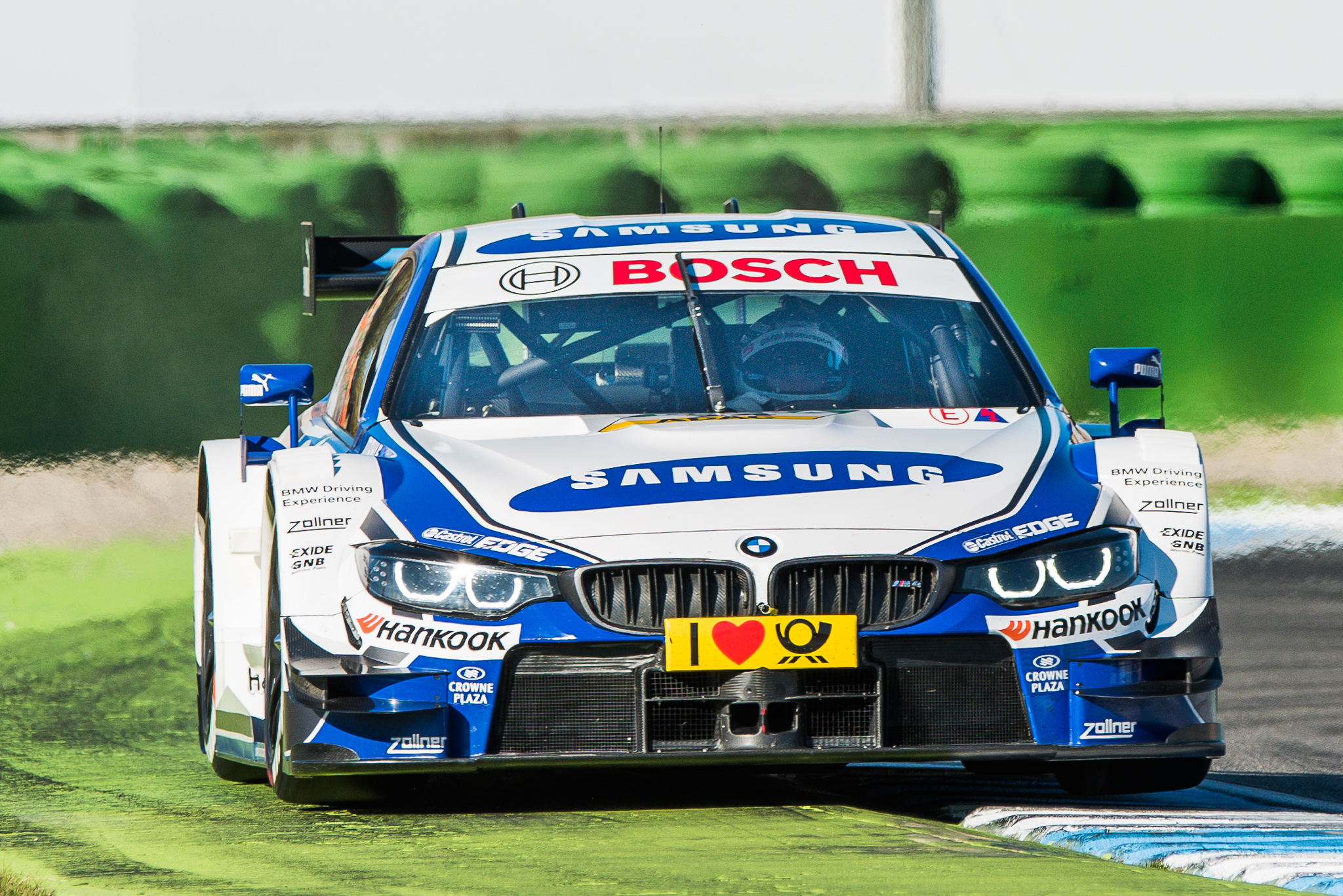 DTM,Deutsche Tourenwagen Masters,Hockenheimring,Maxime Martin,Motorsport,RMG,Reinhold Motorsport GmbH,Samsung BMW M4 DTM